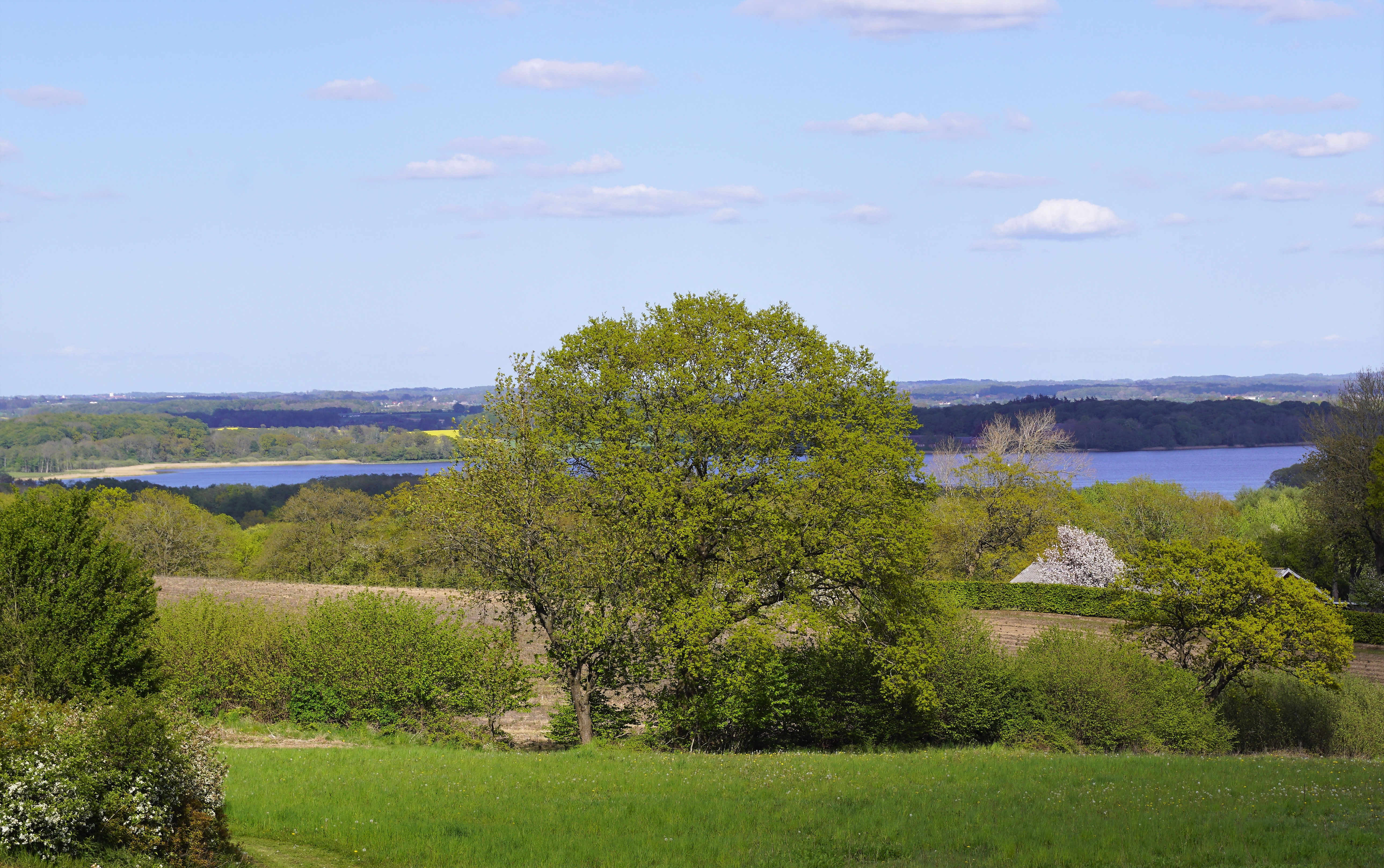 Arreskov Sø på Fyn set fra vest